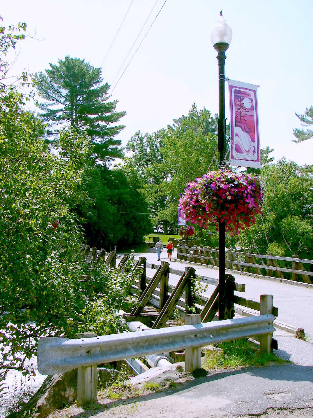 Bala (Muskoka Lakes Township), Ontario, Canada